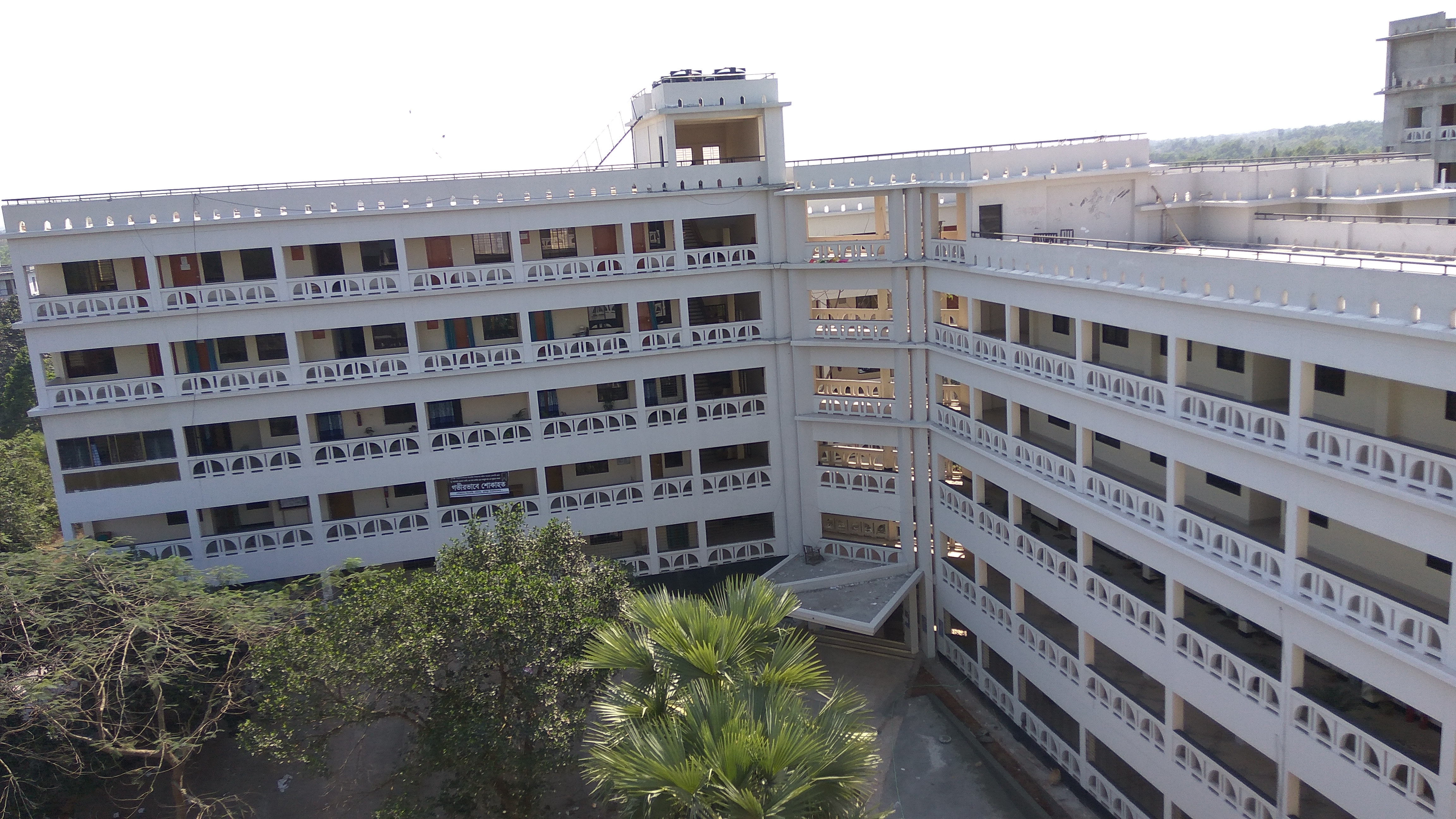 কুমিল্লা বিশ্ববিদ্যালয়